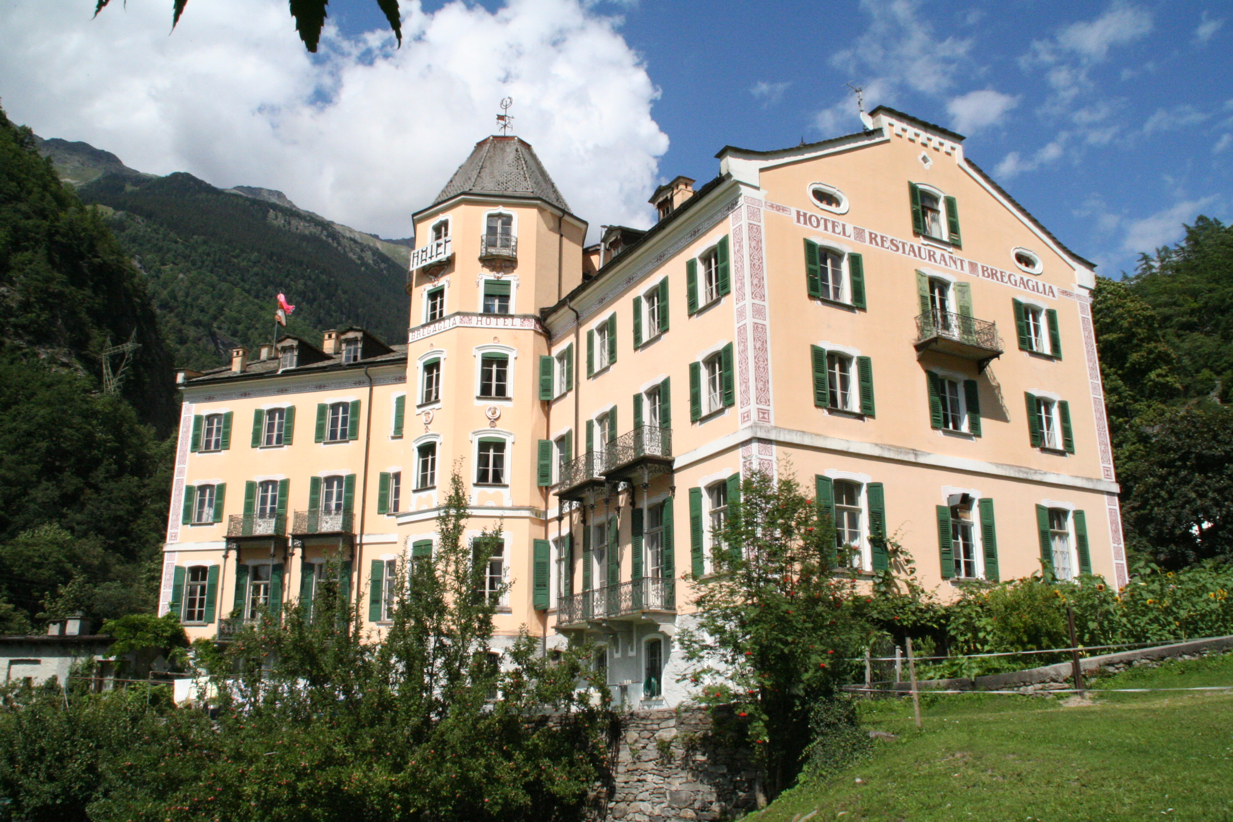 Hotel Bregaglia Talseite